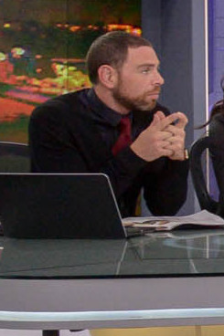 Ministro Díaz participa en noticiarios de Mega y TVN para explicar como se desarrolla el Proceso Constituyente